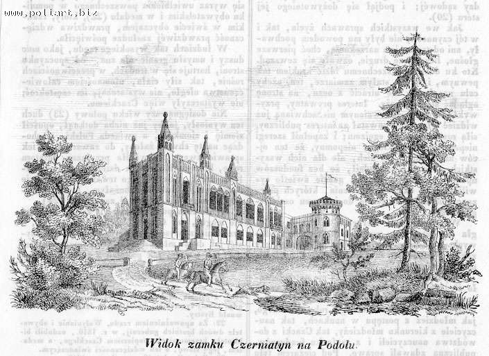 Неоготичний палац Гната Вітославського 1830 р.: Неоготичний палац Гната Вітославського 1830 р.